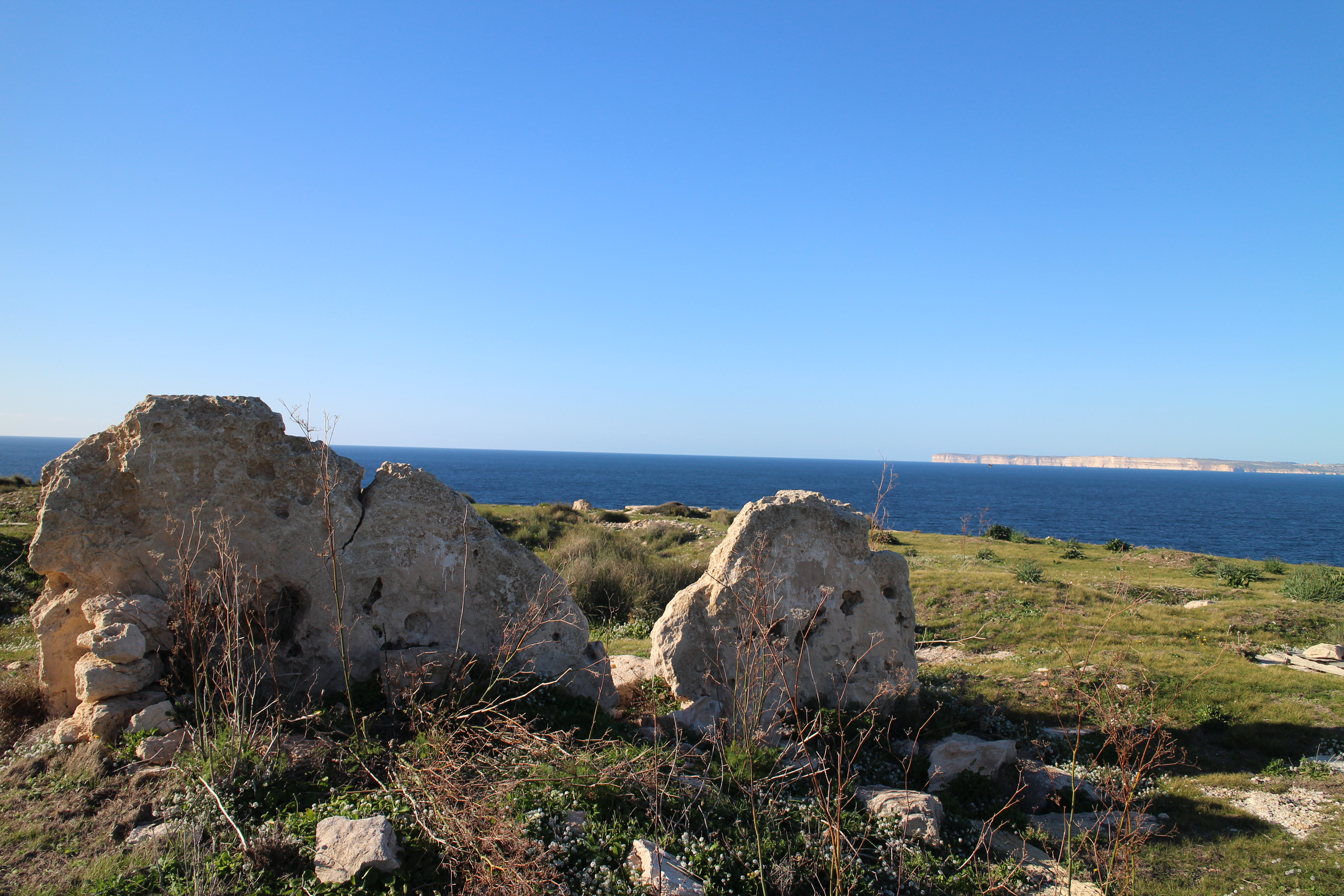 Ras ir-Raheb